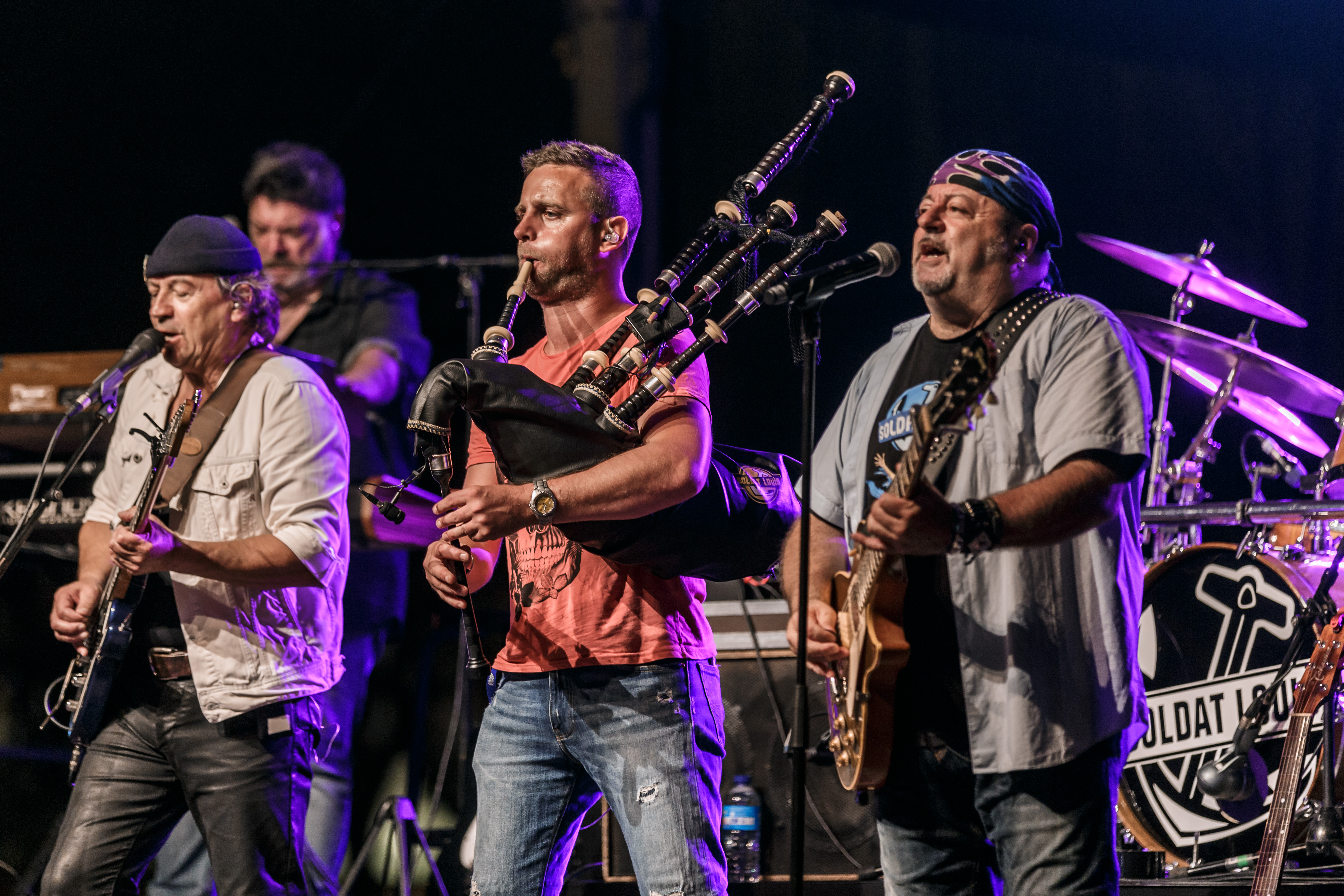 Soldat Louis en concert gratuit place de la Résistance à Quimper en clôture du festival de Cornouaille le dimanche 24 juillet 2016.